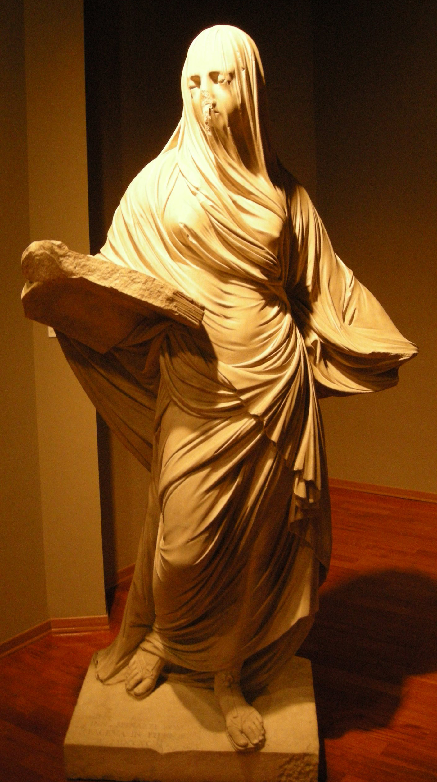 Innocenzo Spinazzi, La religione, 1794